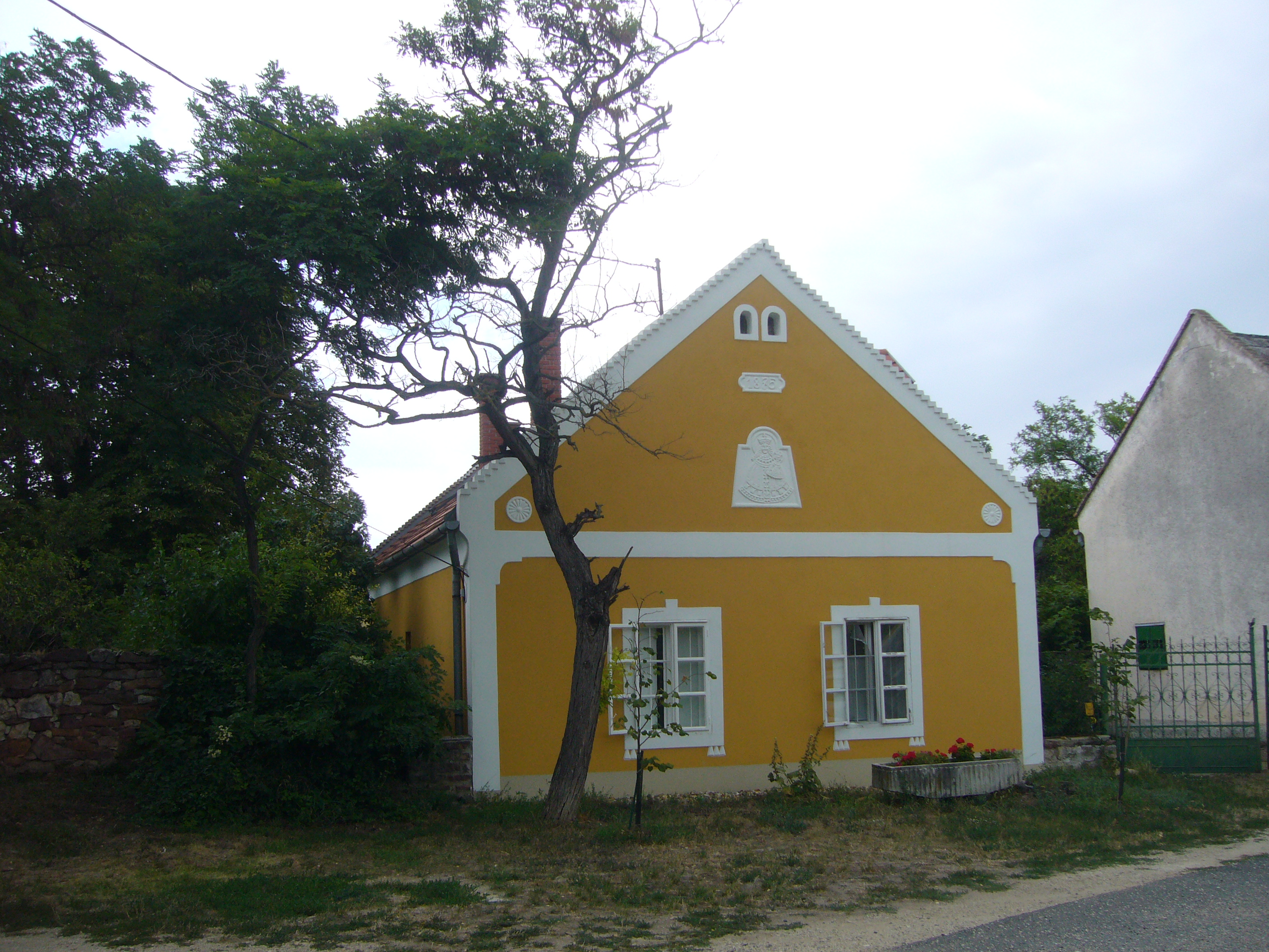 Tagyon ház